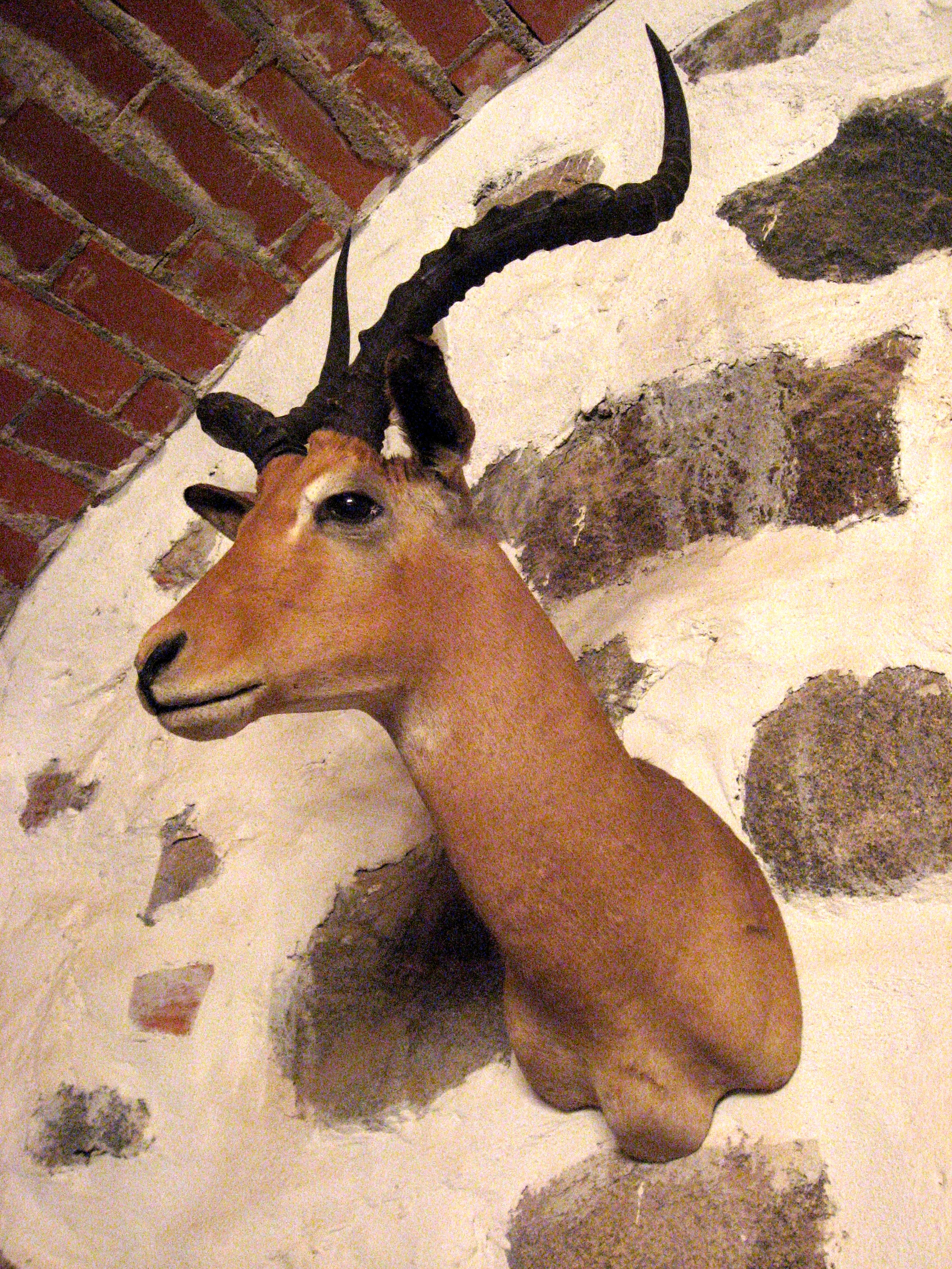 Hrad Trakai, hlava